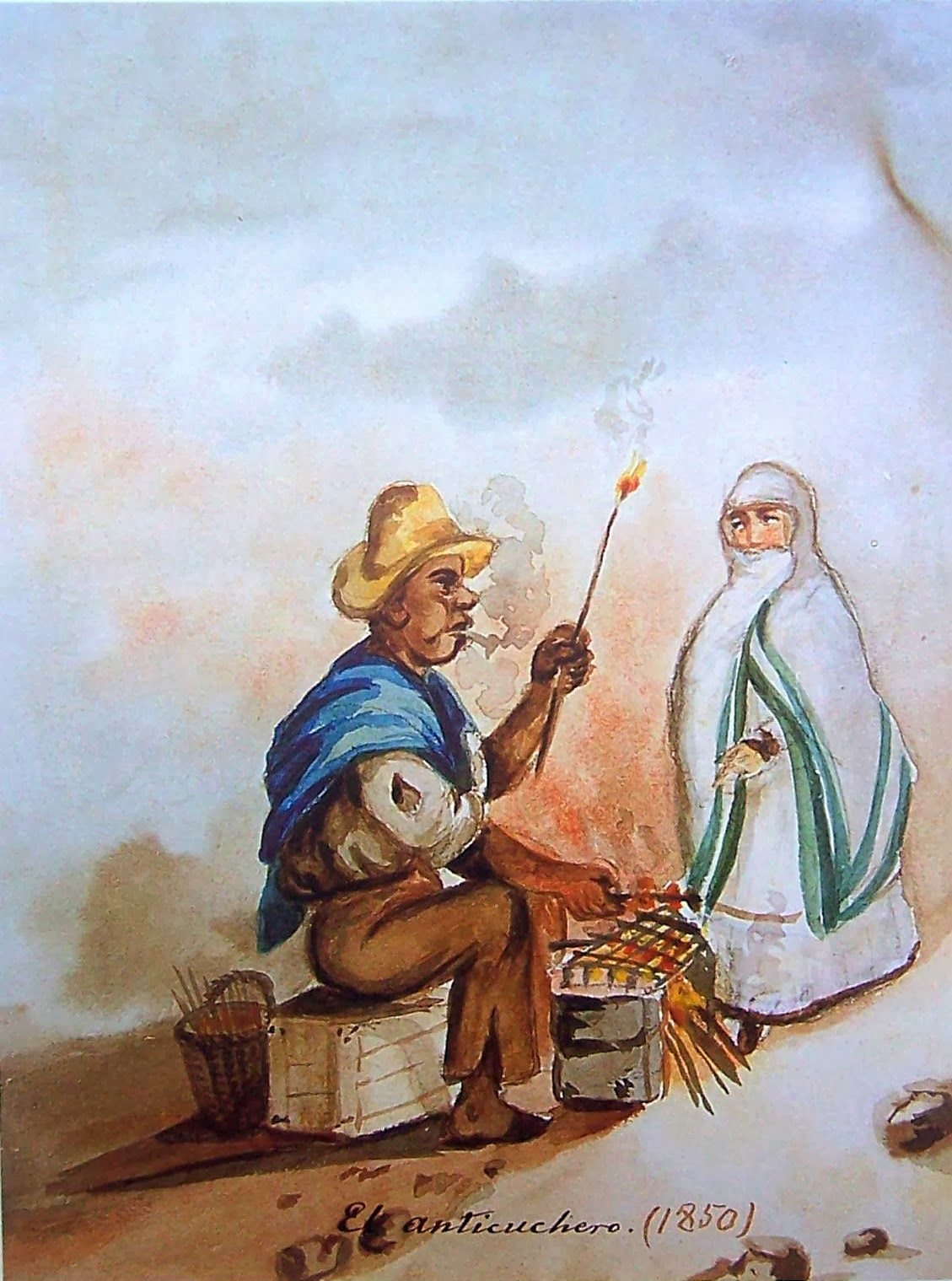 Acuarela de Pancho Fierro